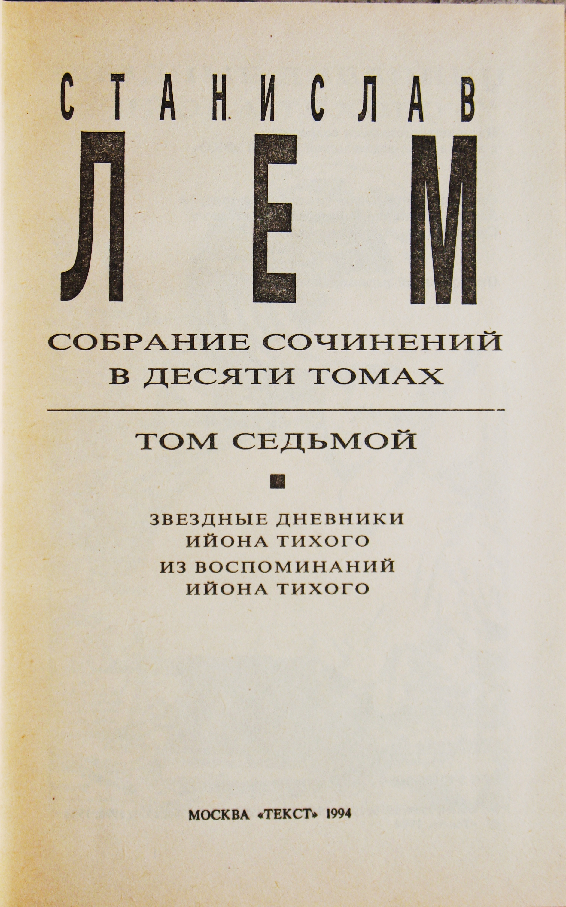 Stanislav Lem book. Moscow. С. Лем. Звездные дневники. 7 том сс в 10 томах. М, 1994, титульный лист.